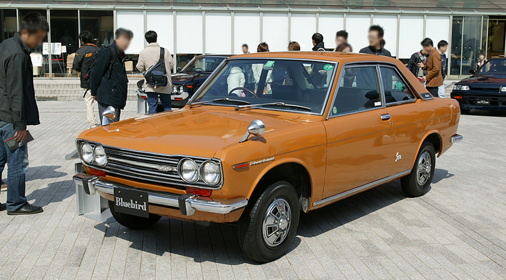 Datsun Bluebird Coupe 1600 SSS (510)